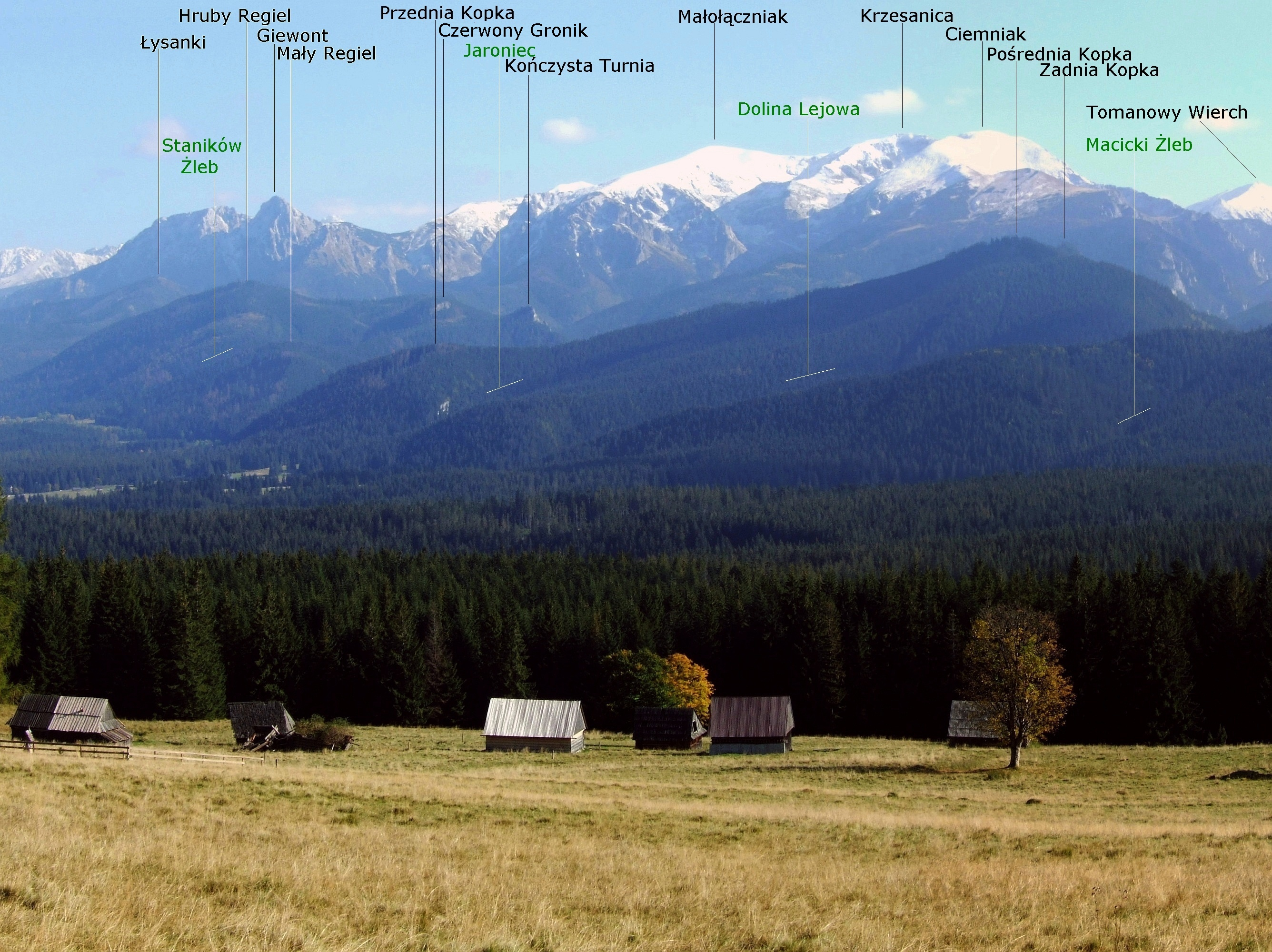 Widok z polany Koszarzyska na Przysłopie Witowskim